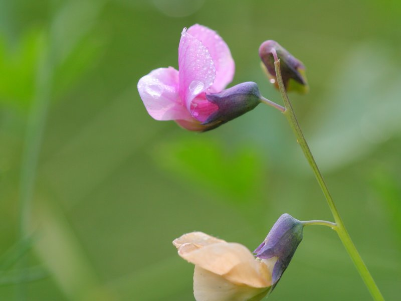 Berg-Blatterbse (Lathyrus linifolius)